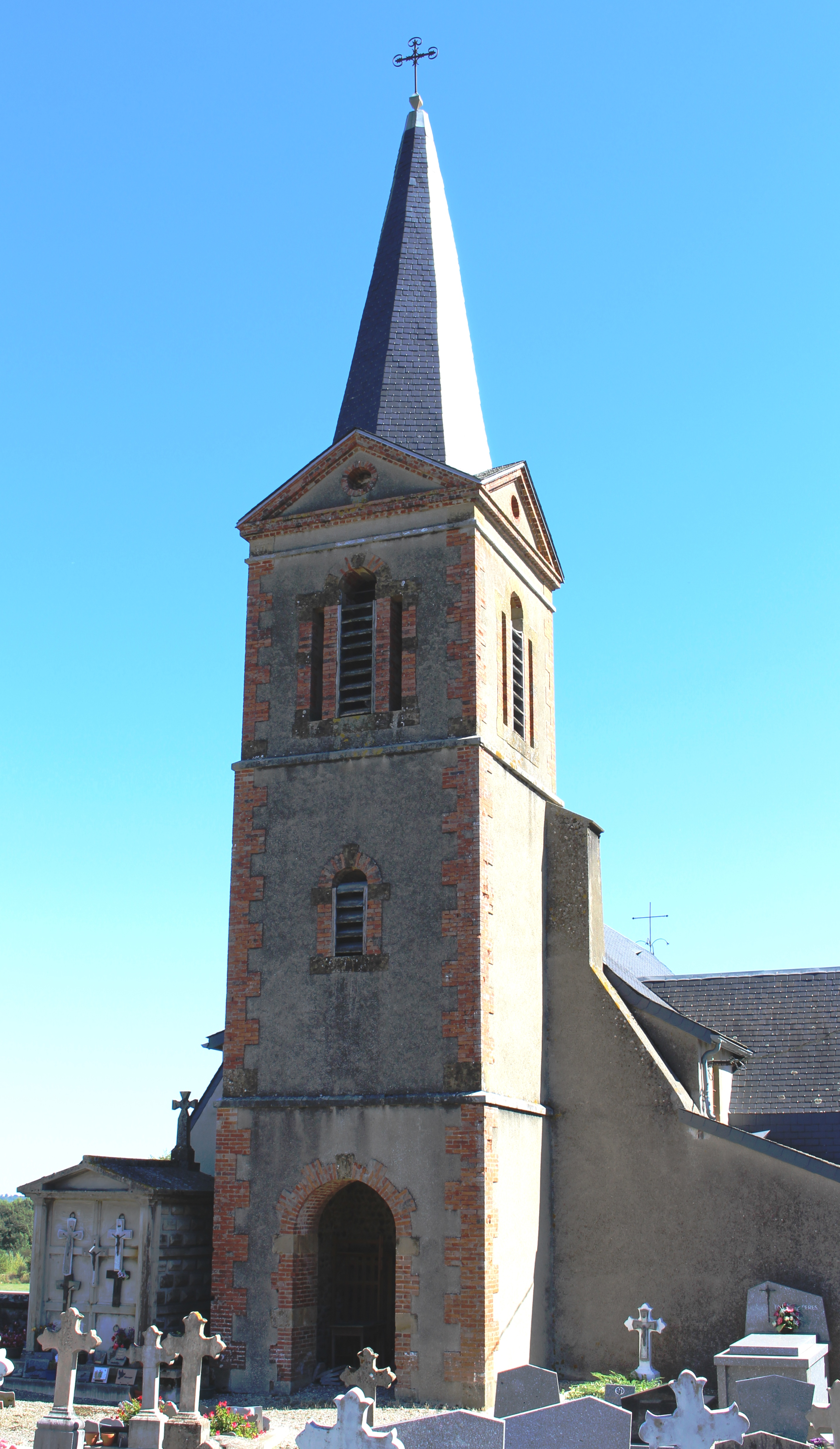 Église Saint-Laurent de Villembits (Hautes-Pyrénées)